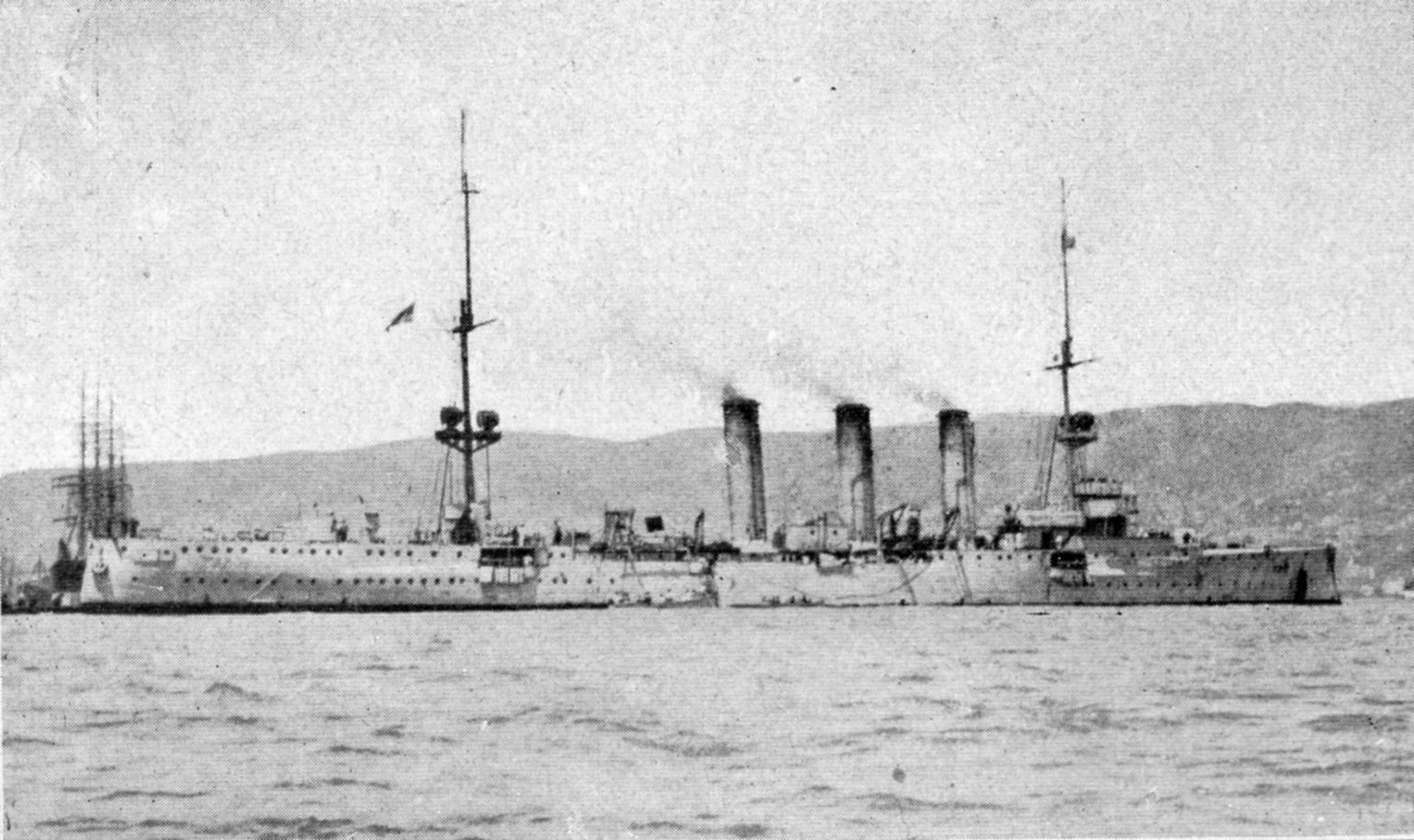 Kleiner Kreuzer SMS DRESDEN in Valparaiso, Chile, 13. November 1914